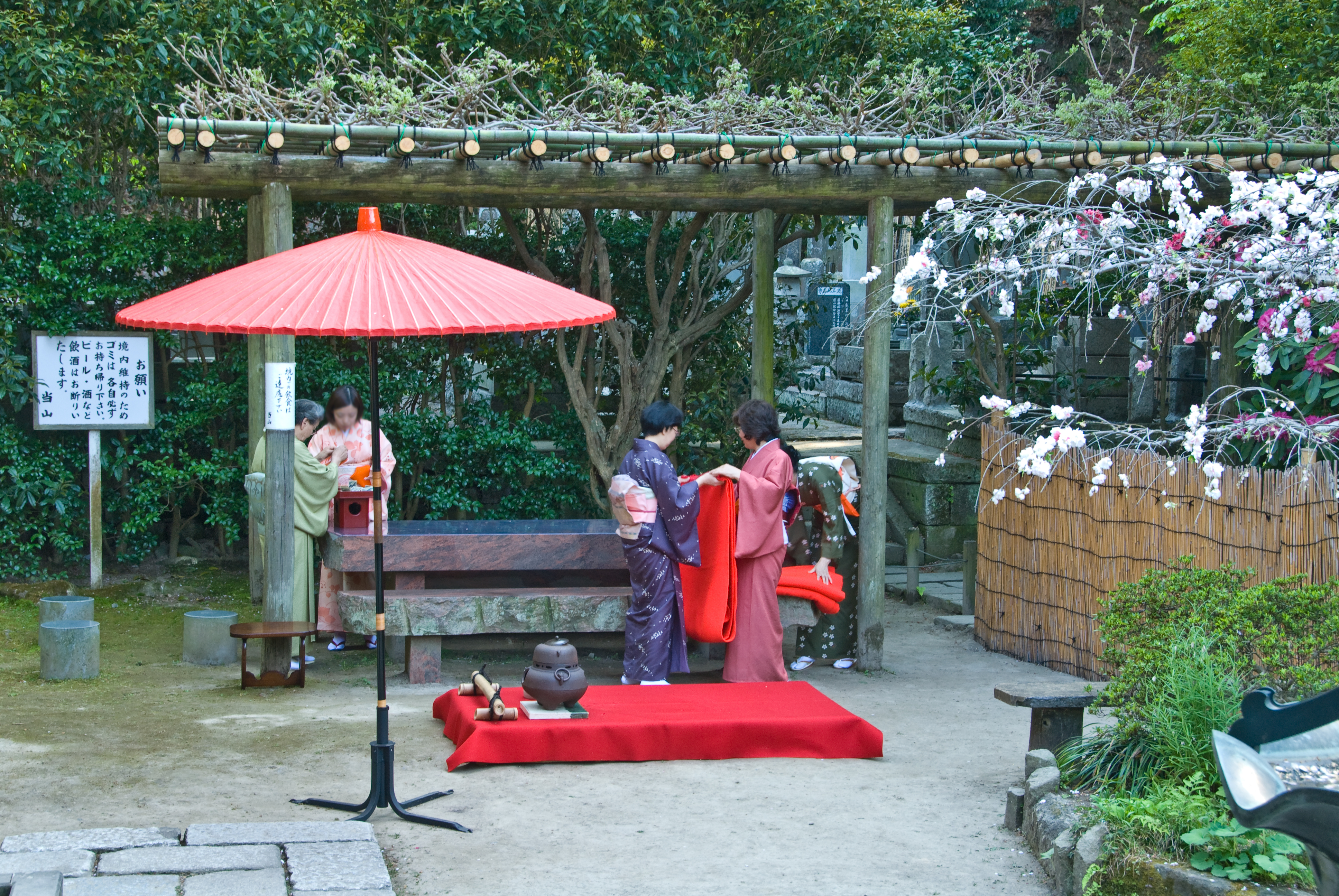 Cha-no-yu (tea ceremony) at Ankokuronji, a Nichiren temple in Kamakura, Kanagawa